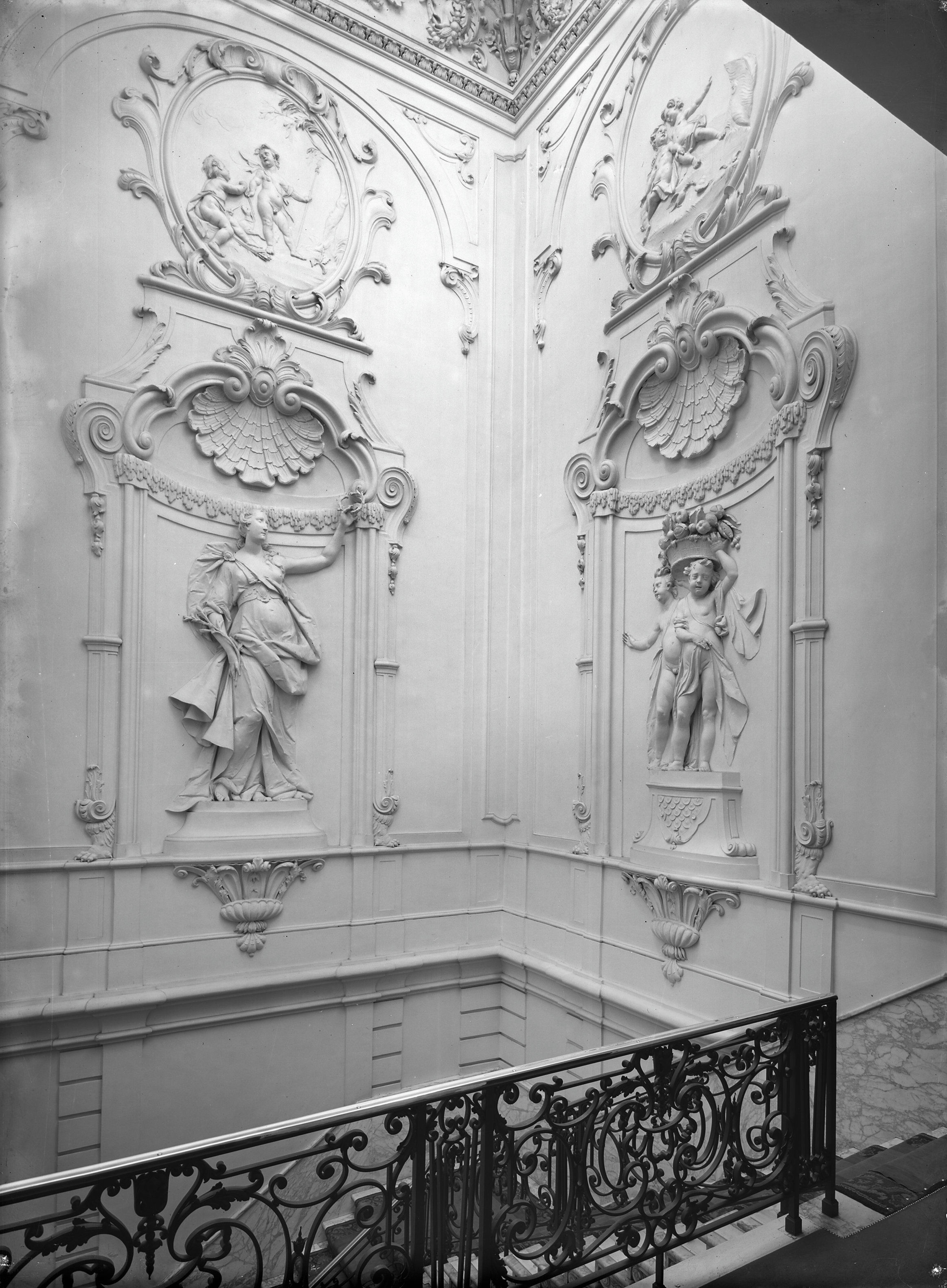 Kon.Bibliotheek: interieur trappenhuis